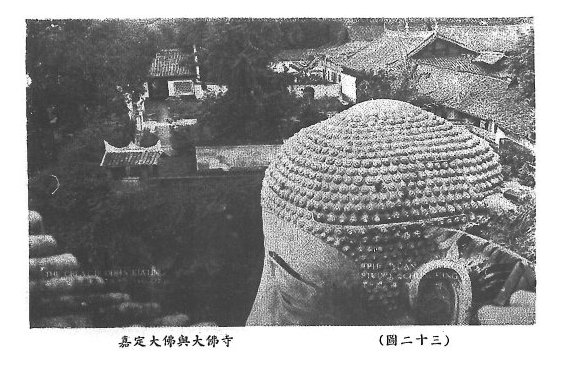 中文（台灣）: 峨眉山老照片